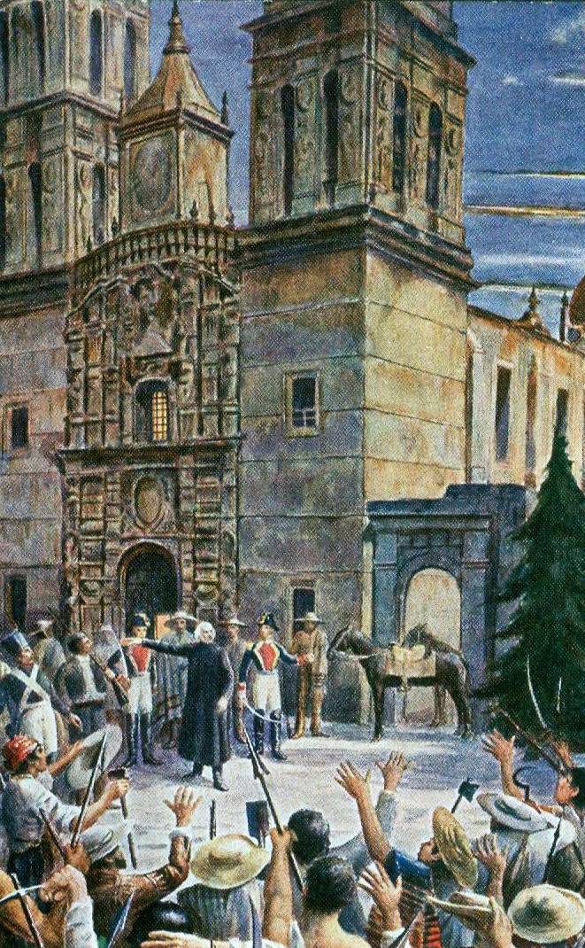 Lámina 4. Adrián Unzueta, «El cura D. Miguel Hidalgo proclama la Independencia Nacional en Dolores, a la madrugada del 16 de septiembre de 1810, no obstante que no tenía terminados aún los preparativos para la Revolución.» 1910. Buznego y Cía, Tarjeta Postal. Cromolitografía, 13.9 x 8.8 cm.